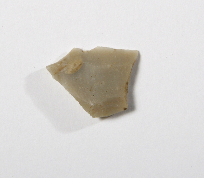 Armatura geometrica in selce per freccia (trapezio), per cacciare selvaggina. Prodotto della scheggiatura della pietra.